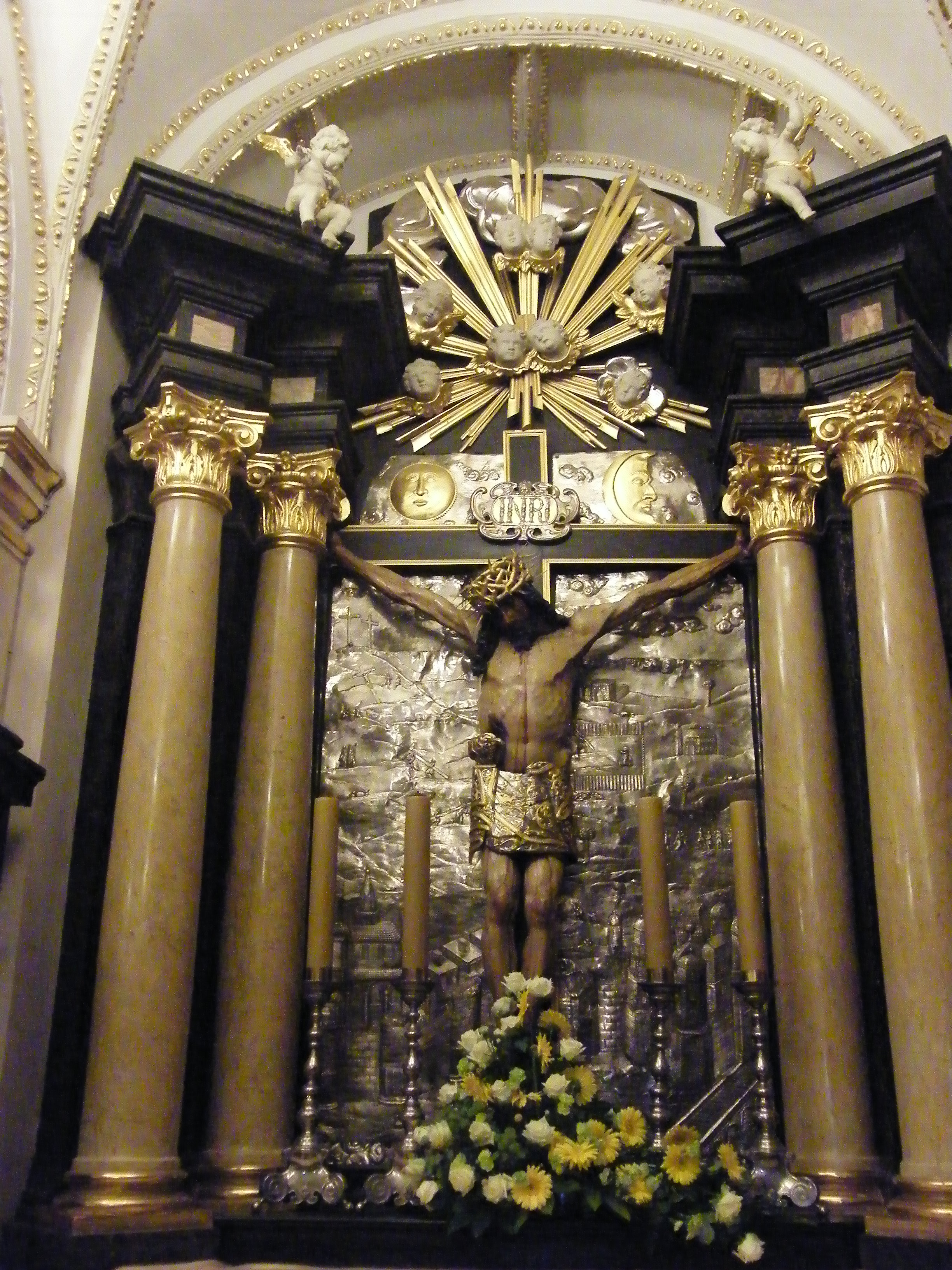 Częstochowa, kaplica pw. NMP, 1430-1460, 1518-1523, 1640-1660, 1930